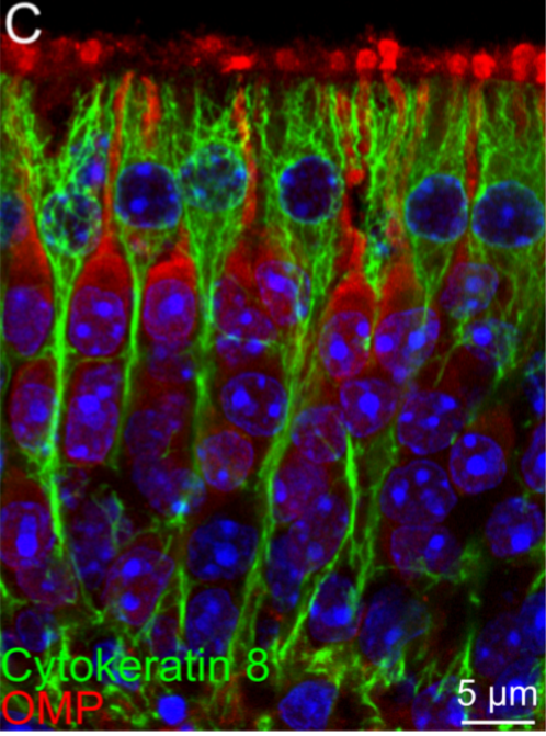 Fig. 4. Marcadores de células de sostén. C: células marcadas con citoqueratina 8 (en verde) con la morfología típica de las células de soporte. Doble tinción con OMP olfactory marker protein, para neuronas (en rojo) Los núcleos celulares se tiñeron con DAPI en azul. Las imágenes son promedios de pilas z de ~1.5 μm de espesor. Barra de escala= 5 μm